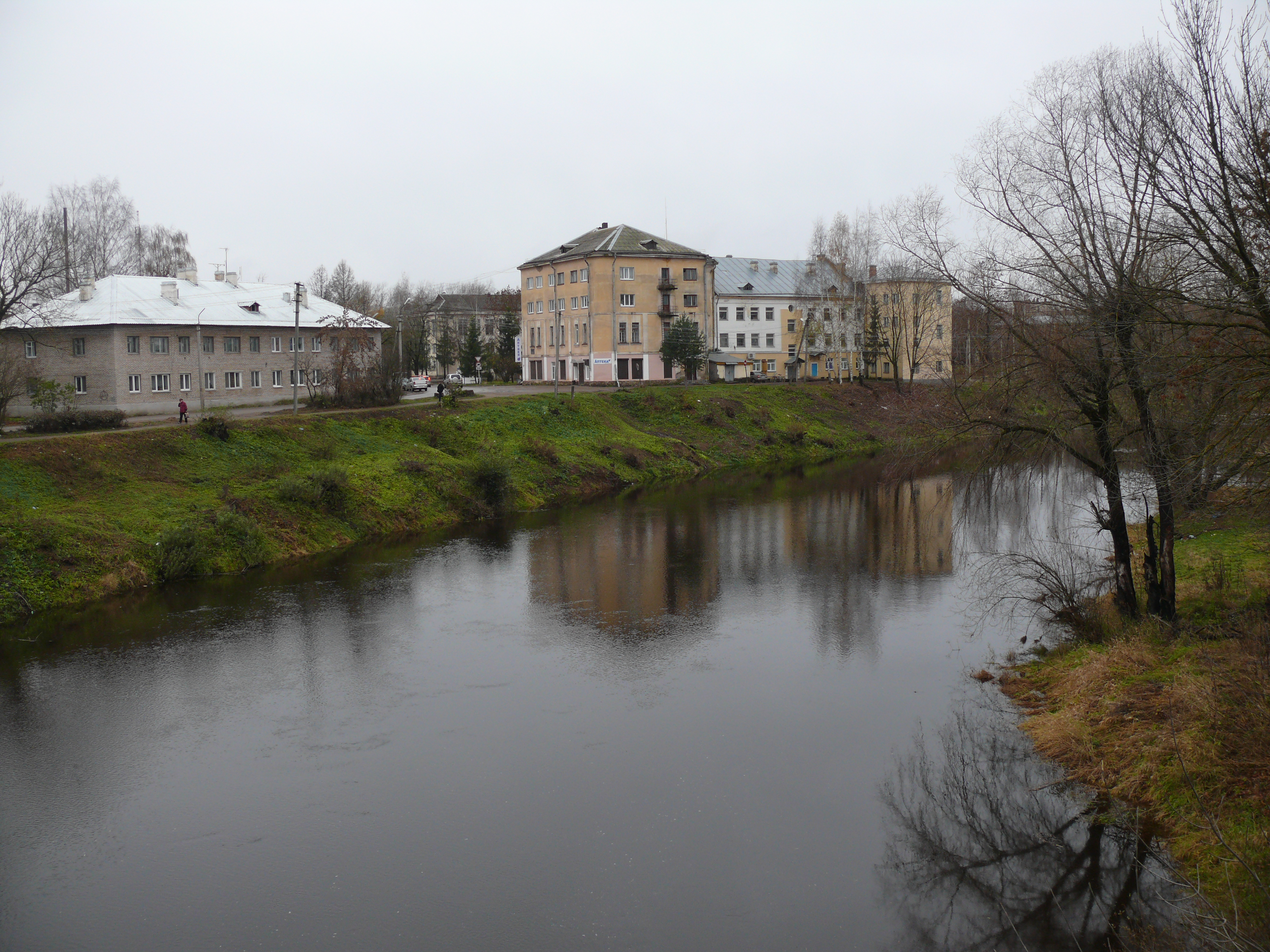 Порхов (Псковская область). Вид на Шелонь с железного моста